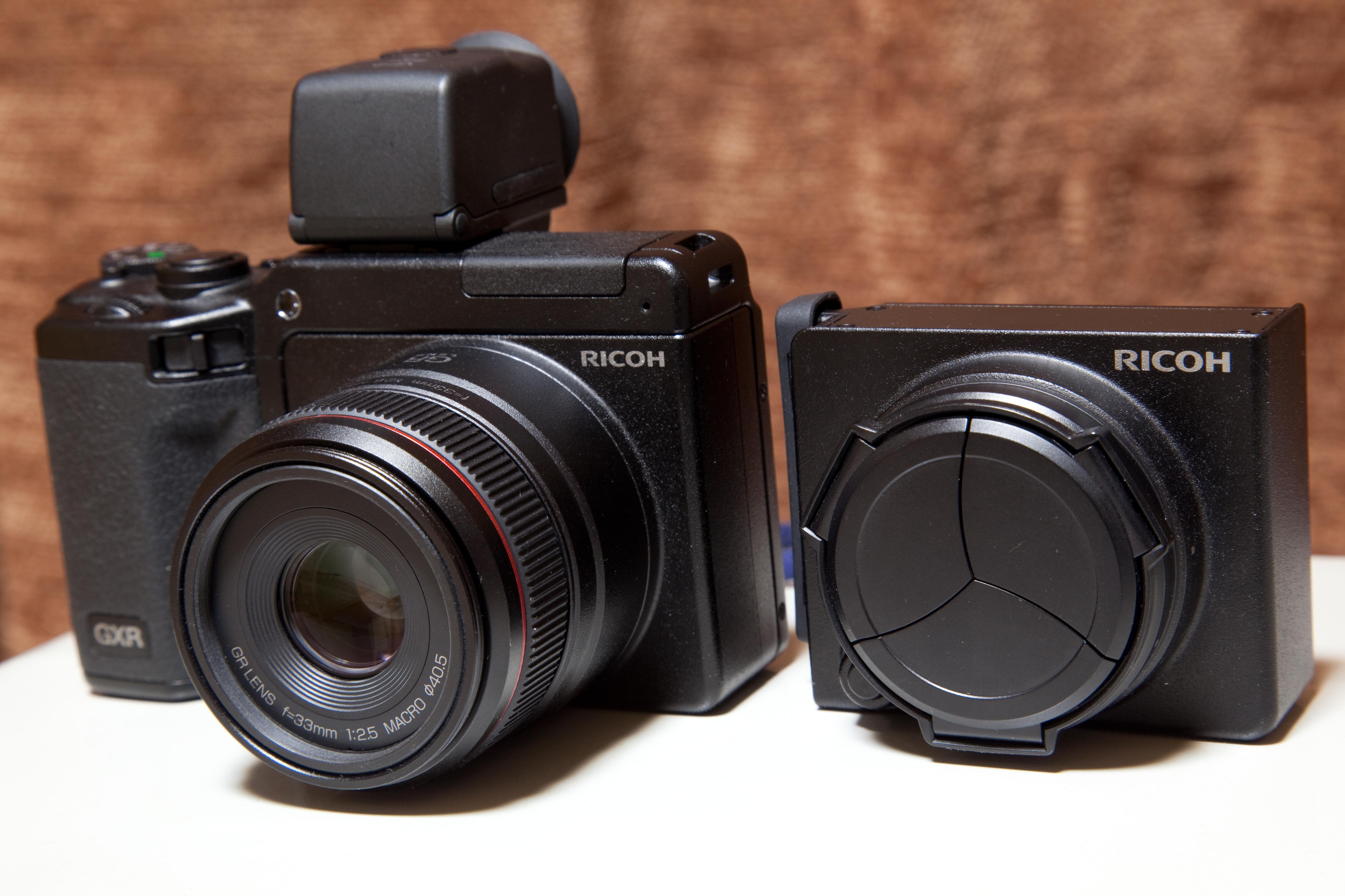 RICOH GXR A12 & S10